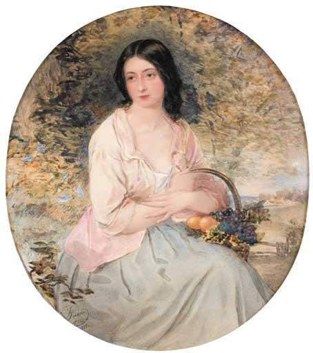 Портрет Н. И. Фогель фон Фризенгоф. Бумага, акварель. 1858 (?)